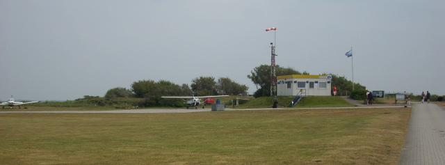 Abfertigungsgebäude vom Flugplatz Baltrum